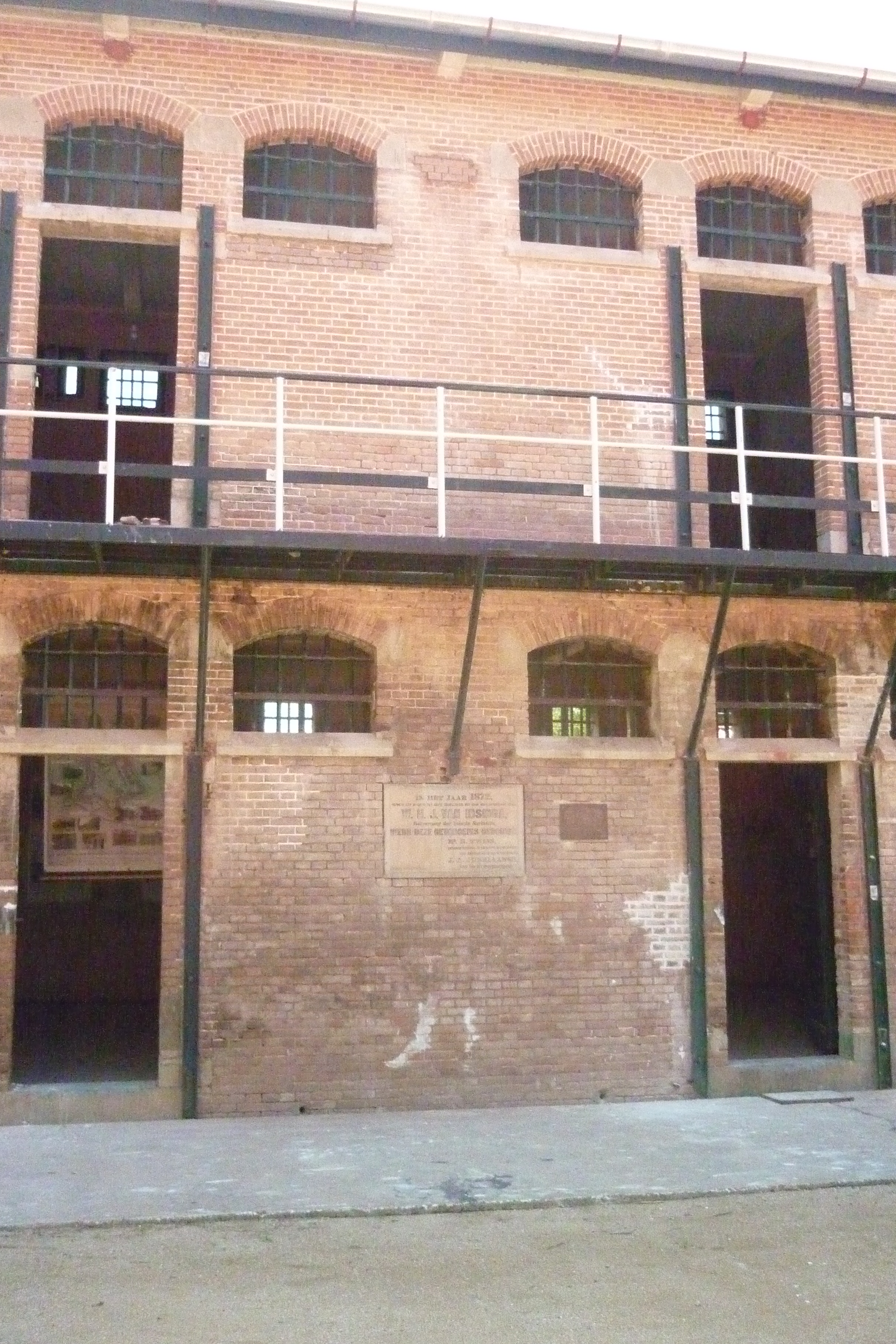 Gevangenis in Fort Nieuw-Amsterdam